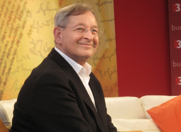 Péter Nádas - Leipziger Buchmesse 2012